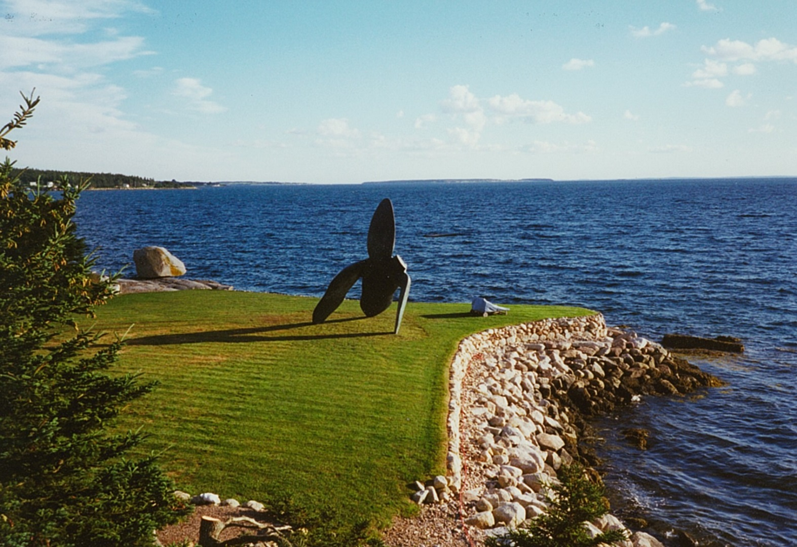 Kobe – Arcade – 1999 – Bronze - 670 x 630 x 440 cm